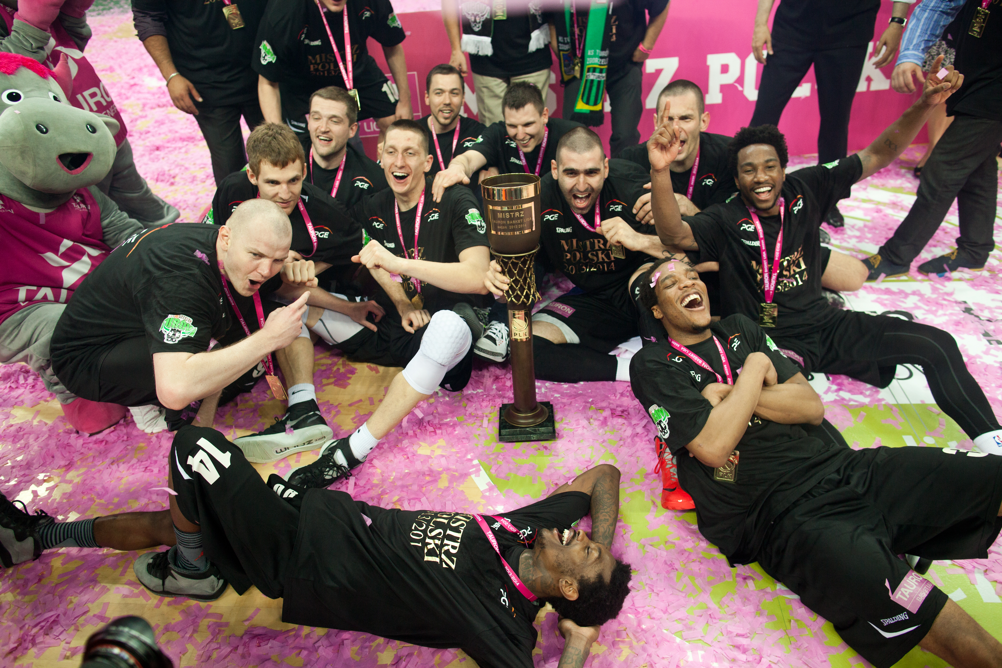 zawodnicy PGE Turów Zgorzelec świętujący zdobycie Mistrzostwa Polski Tauron Basket Liga